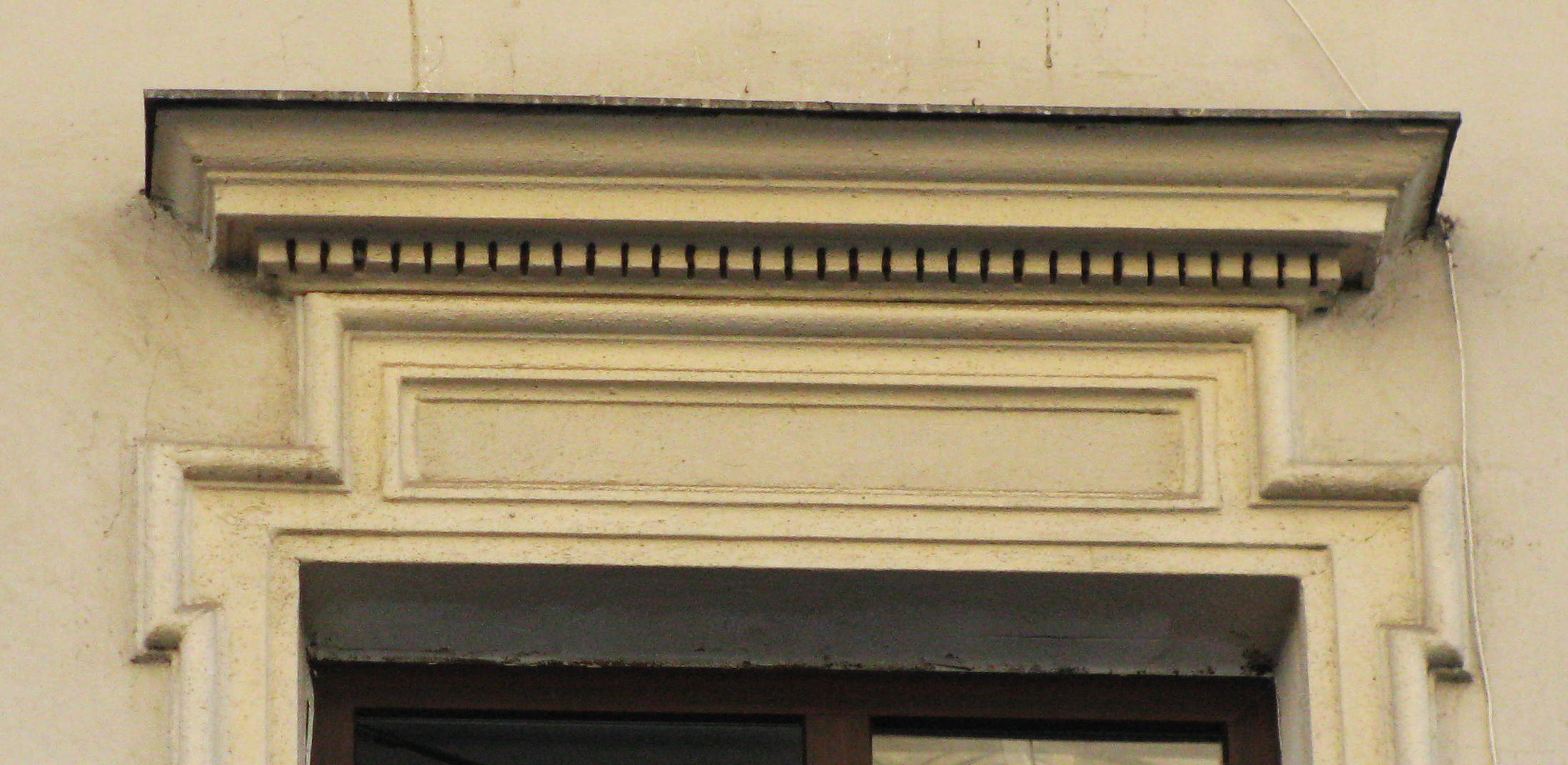 Вулиця Галицька,18 (1873)